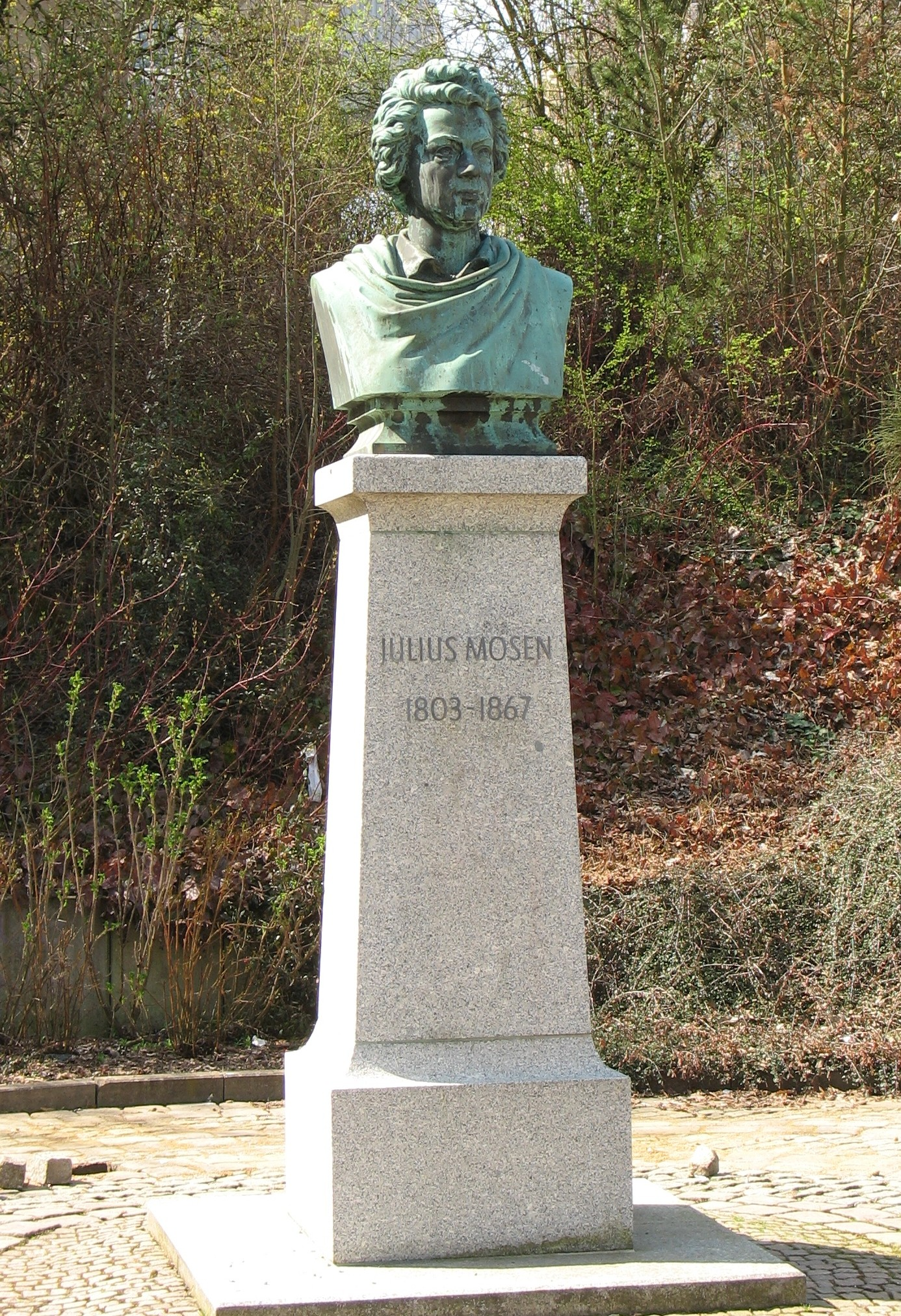 Plauen, denkmalgeschützte Büste Julius Mosens von Gustav Adolph Kietz am Unteren Graben zwischen Postplatz und Herrenstraße.